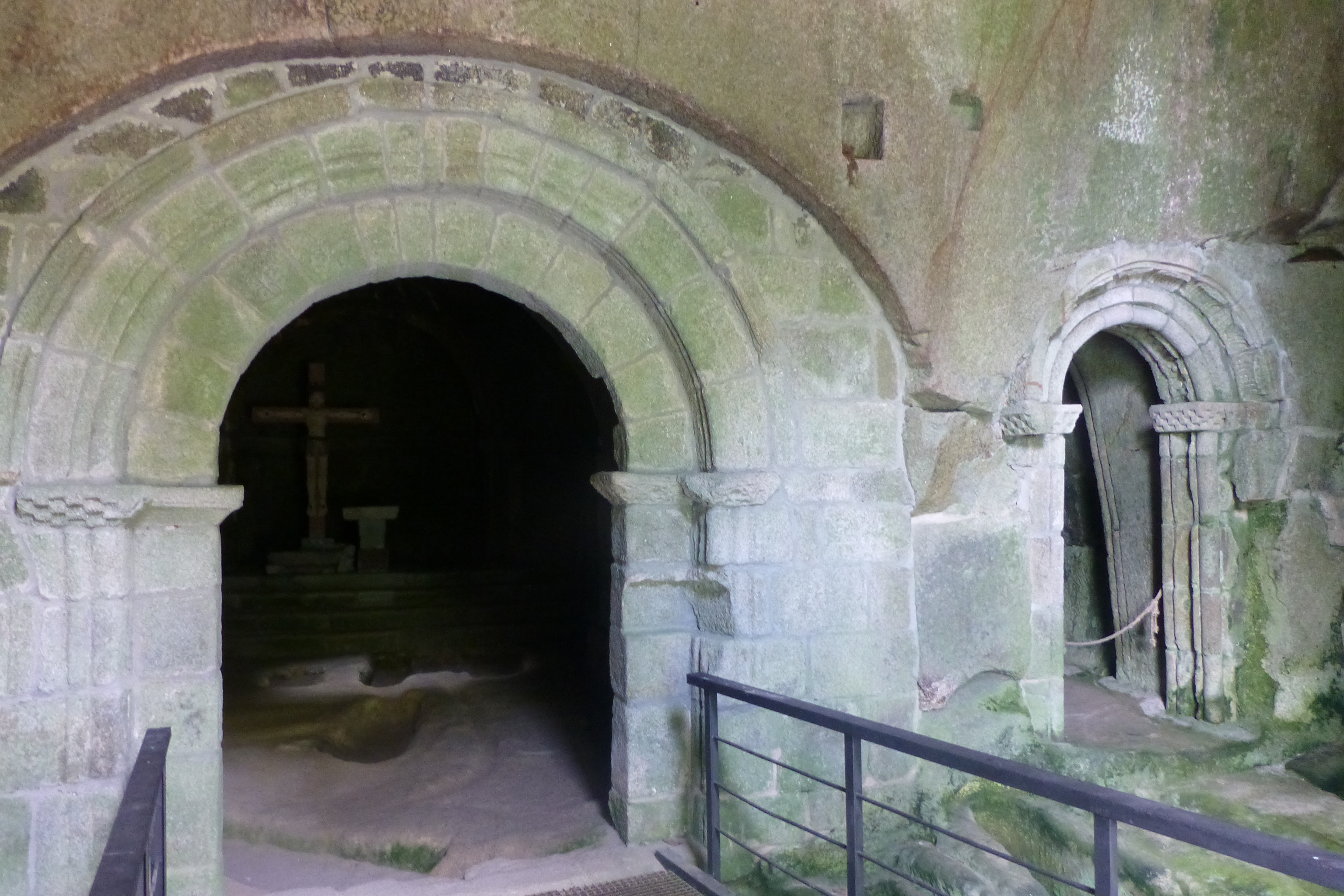 Entrada a la iglesia del monasterio de San Pedro de Rocas en Esgos, Ourense Galicia España.